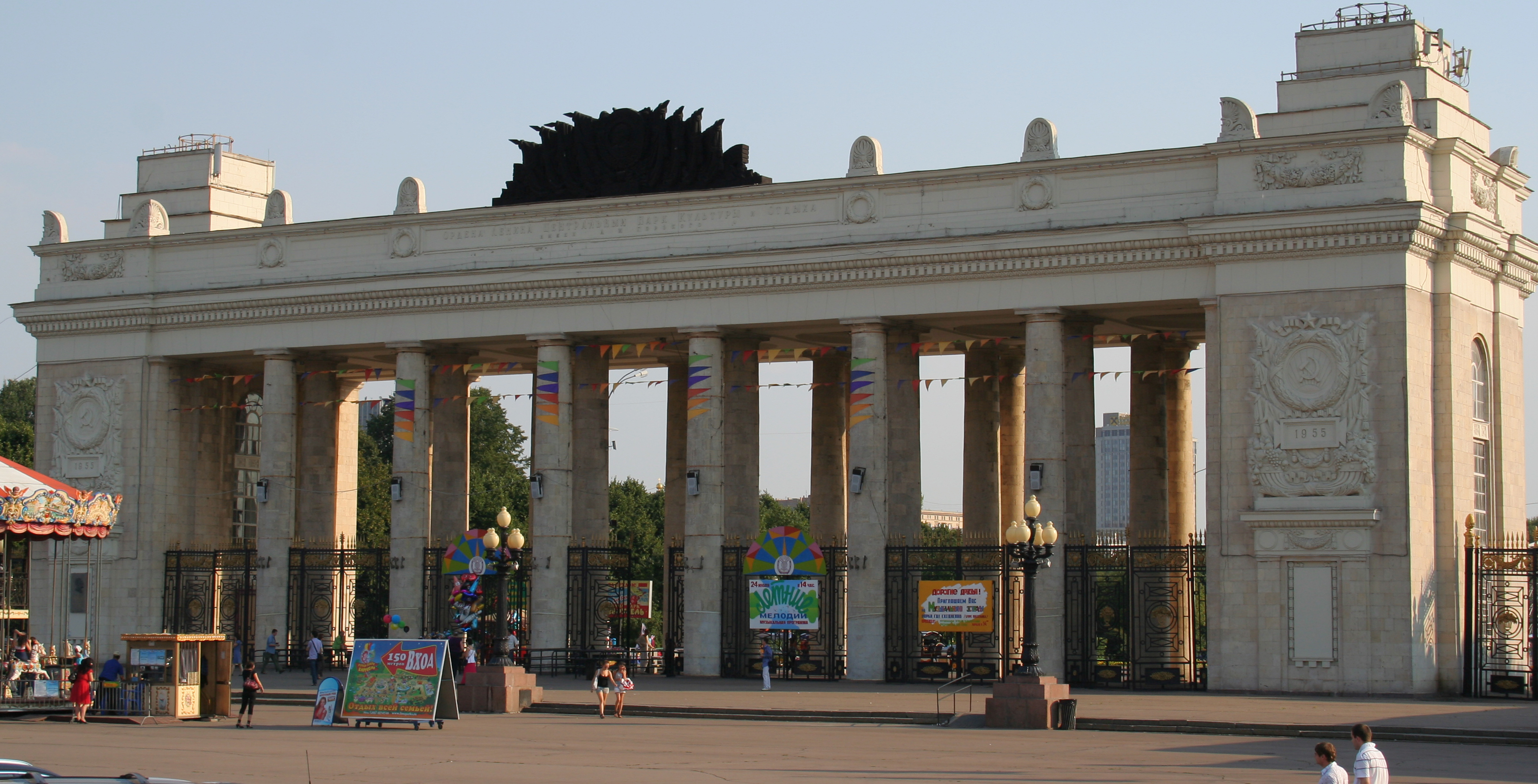 Der Gorki-Park in Moskau. Eingangsportal am Gartenring.